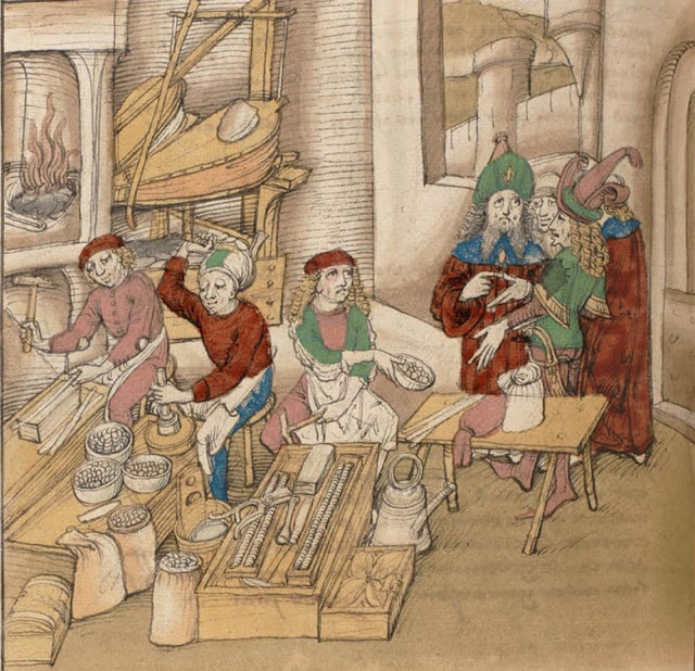 “Officina della Moneda” della Serenissima”. Mercaanti in Venezia.